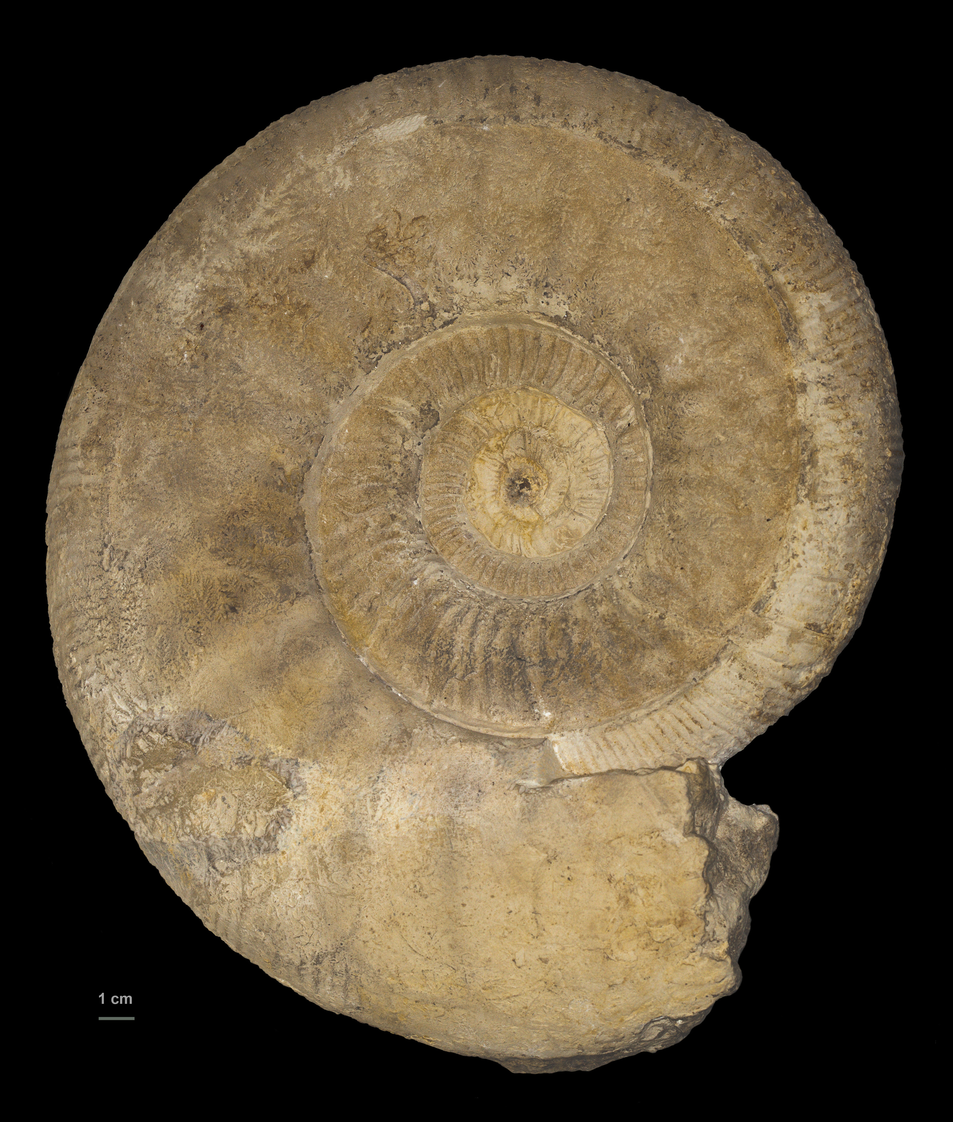 Etage: Kimméridgien, Sous-étage: inférieur, Zone: Rasenia cymodoce, Sous-zone: Lithacosphinctes achilles, Horizon: Lithacosphinctes achilles. -150.8 à –155.7 millions d'années. Museum of Toulouse Native nameMuséum de ToulouseLocationToulouse, FranceCoordinates43° 35′ 38″ N, 1° 26′ 57″ E Established1796: established ; 1865: opened to publicWebsite control : Q422 VIAF: 130895847 ISNI: 0000 0001 2158 3469 SUDOC: 028667107 BNF: 120455376 Museofile: M7013 MHNT.PAL.CEP.2001.98